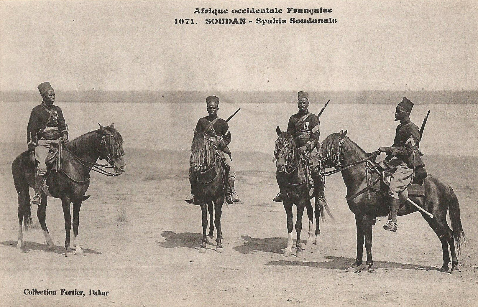 François-Edmond Fortier, Spahis Soudanais. Afrique Occidentale - Soudan.